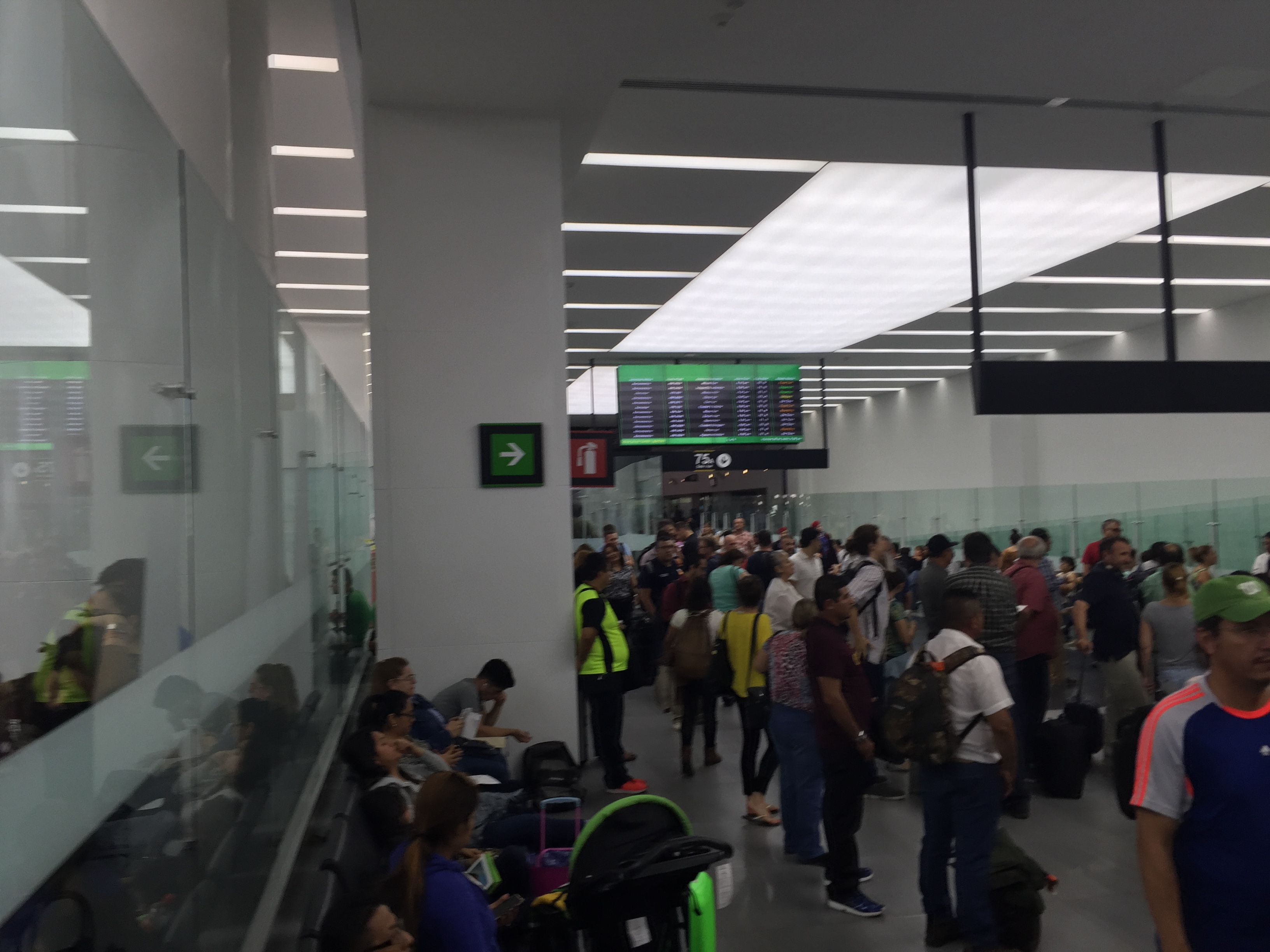 Nueva Sala 75 de la Terminal 2 del Aeropuerto Internacional de la Ciudad de México.